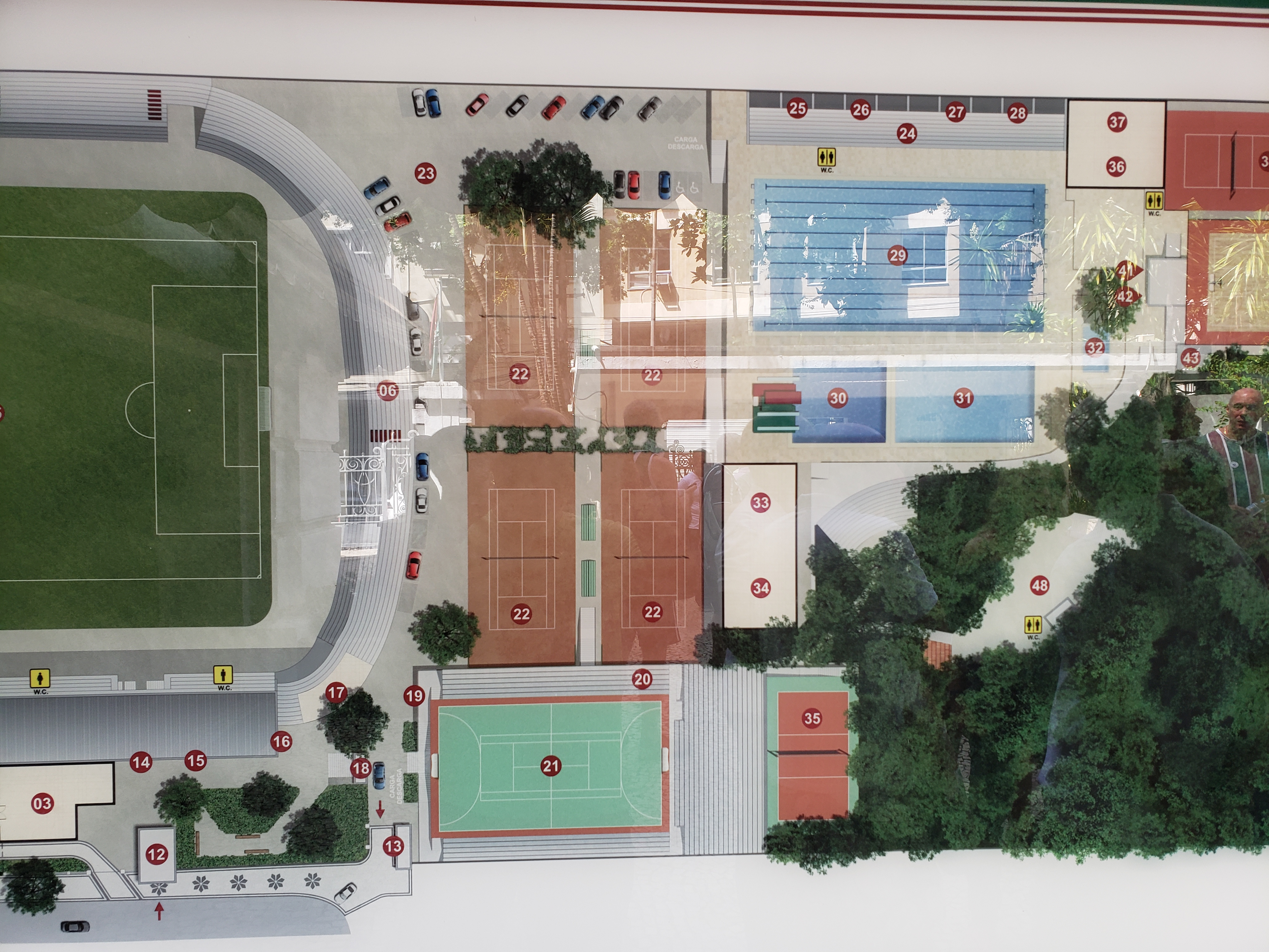 Planta do Fluminense Football Club exposta na sede do clube.